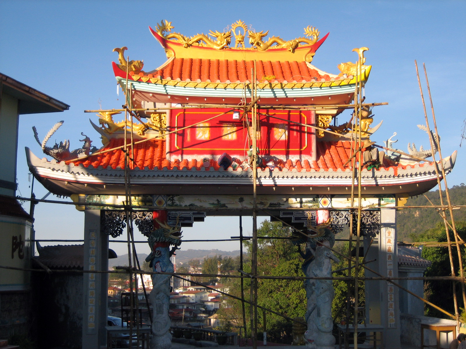 Kwan Yin Si Hpaya Kyaung (Guan Yin Buddhist Monastery), Taunggyi, Shan State, Myanmar (Burma)